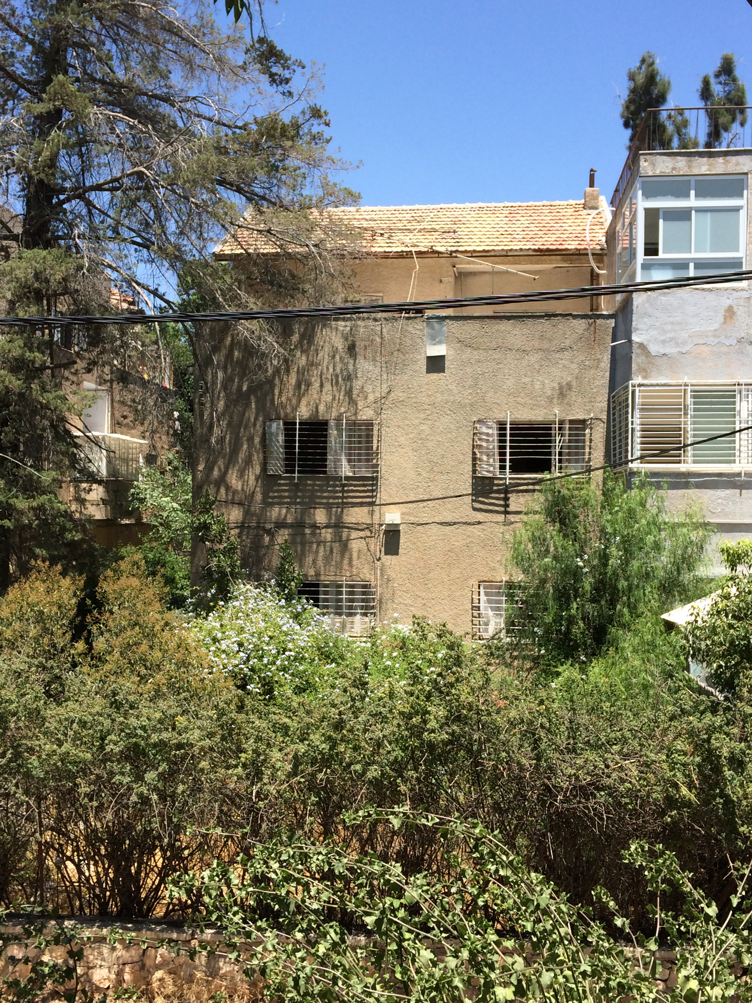 ביתו של של גרשום שלום ברחוב אברבנל 28 בירושלים